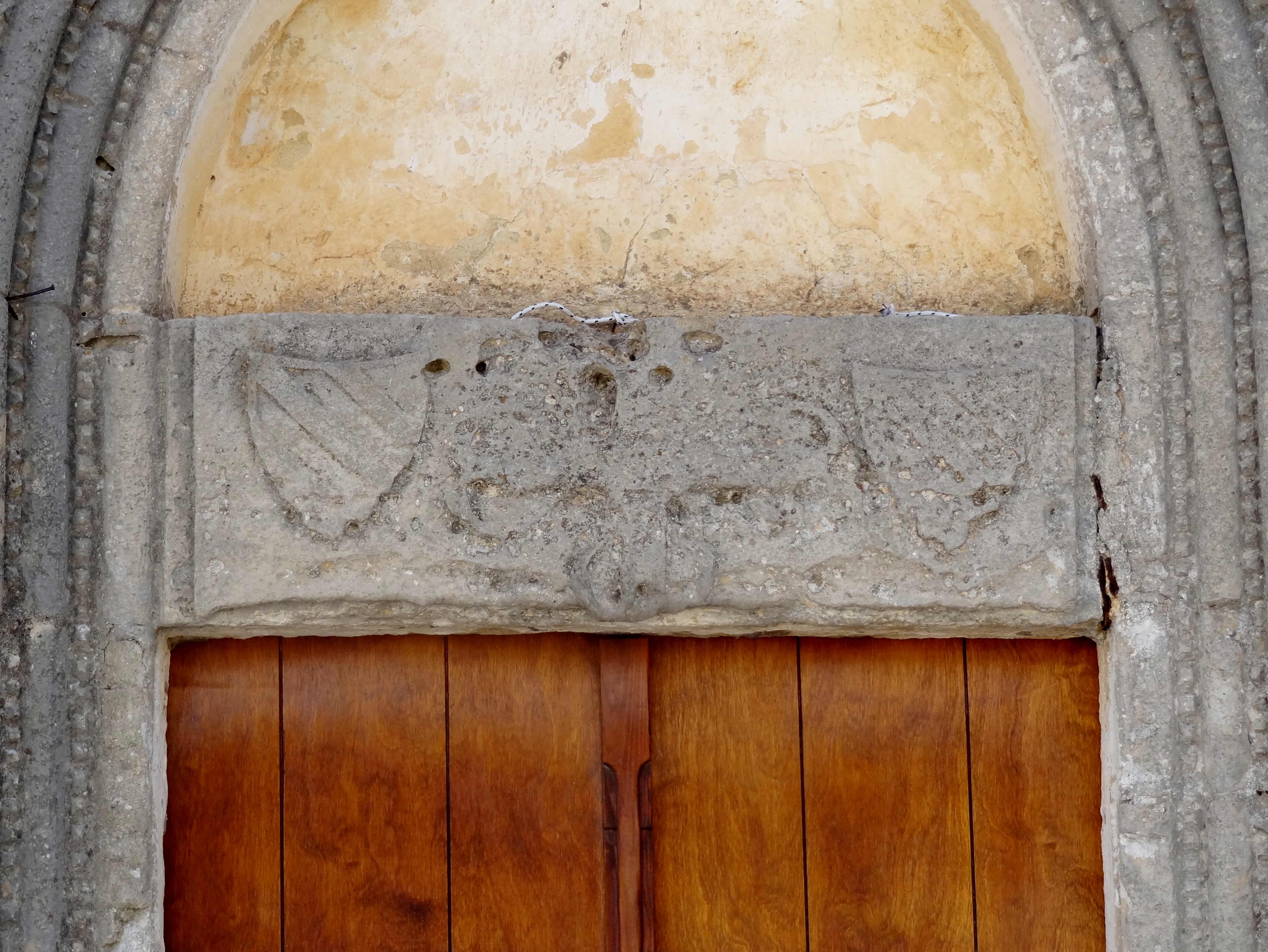 Eingang zur Marienkirche (Ναός Παναγίας) von Thronos, Gemeinde Amari, Kreta, Griechenland